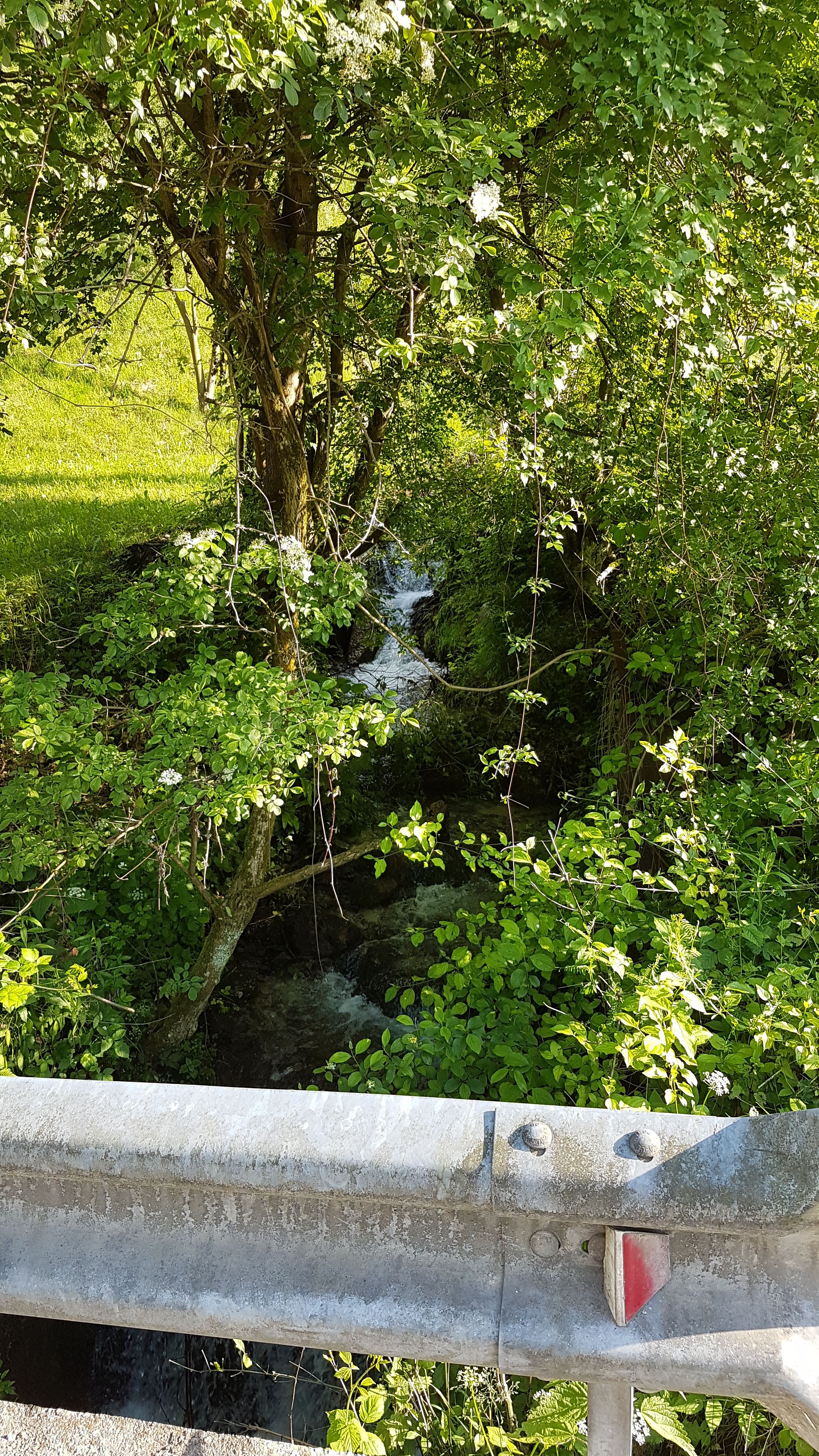 Koritnikov graben, slikan s ceste Hrastnik-Podkraj-Radeče